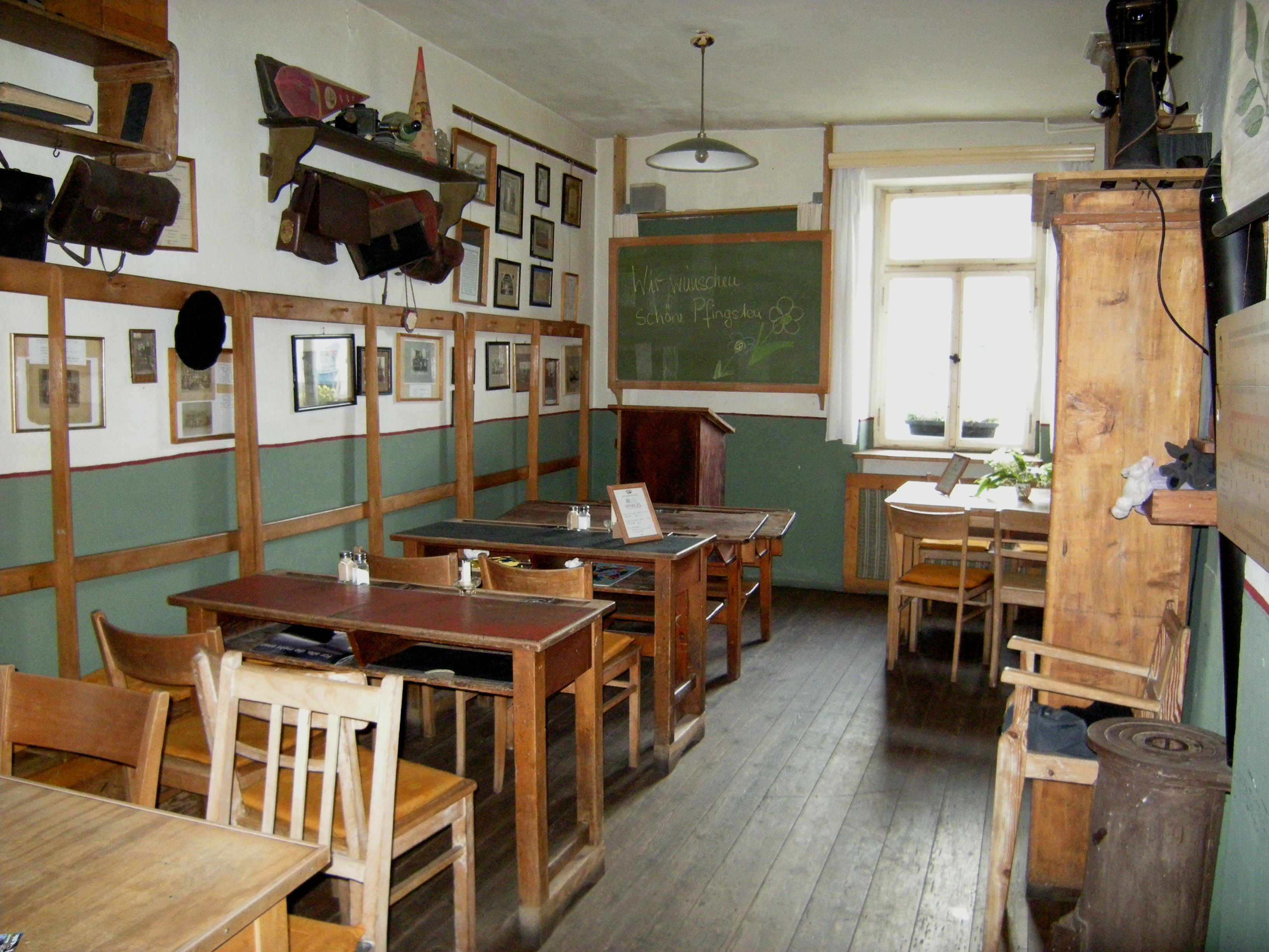 Tangermünde - Gasthaus Kuhschwanz